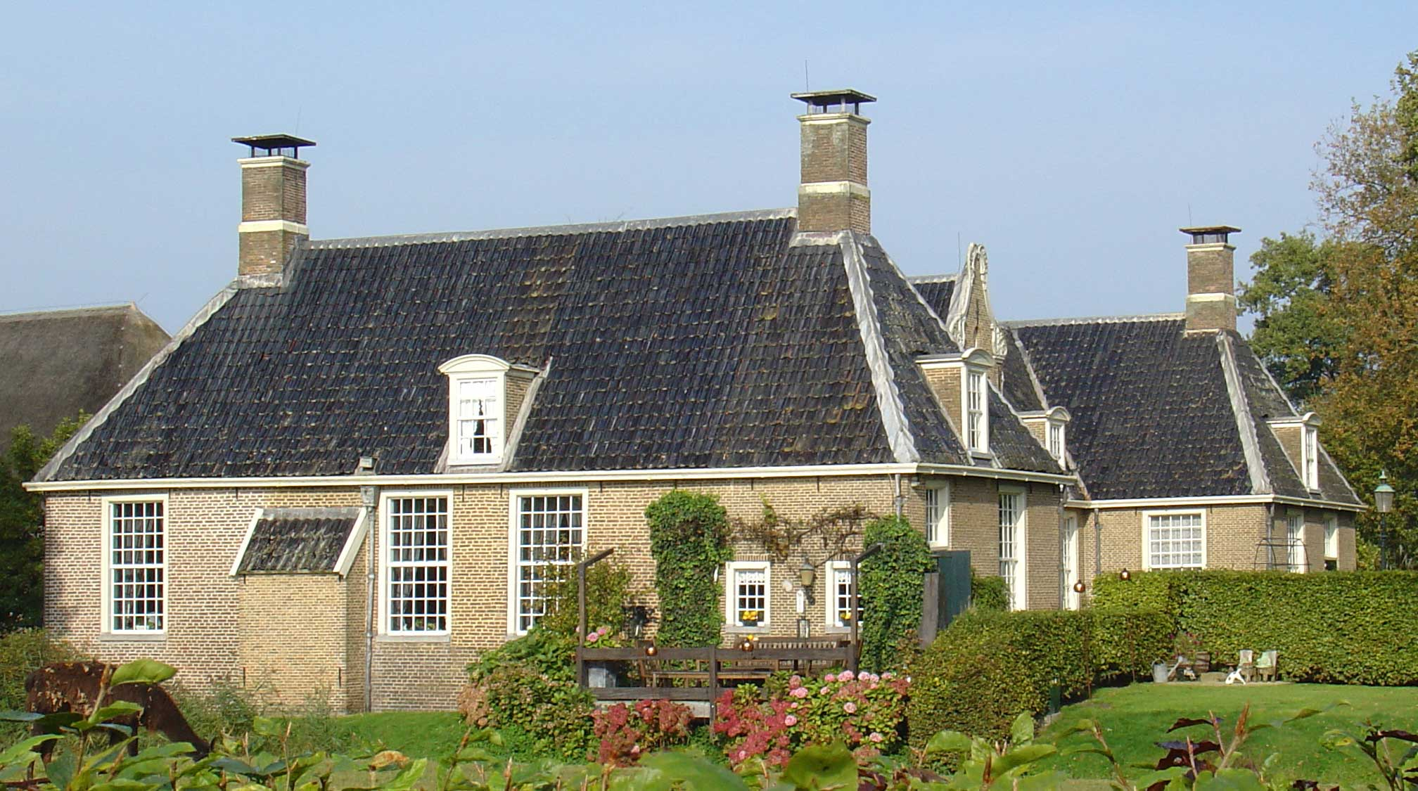 Havezathe de Klencke in Oosterhesselen